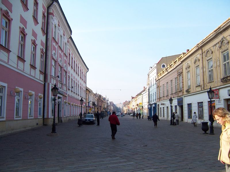 Košice